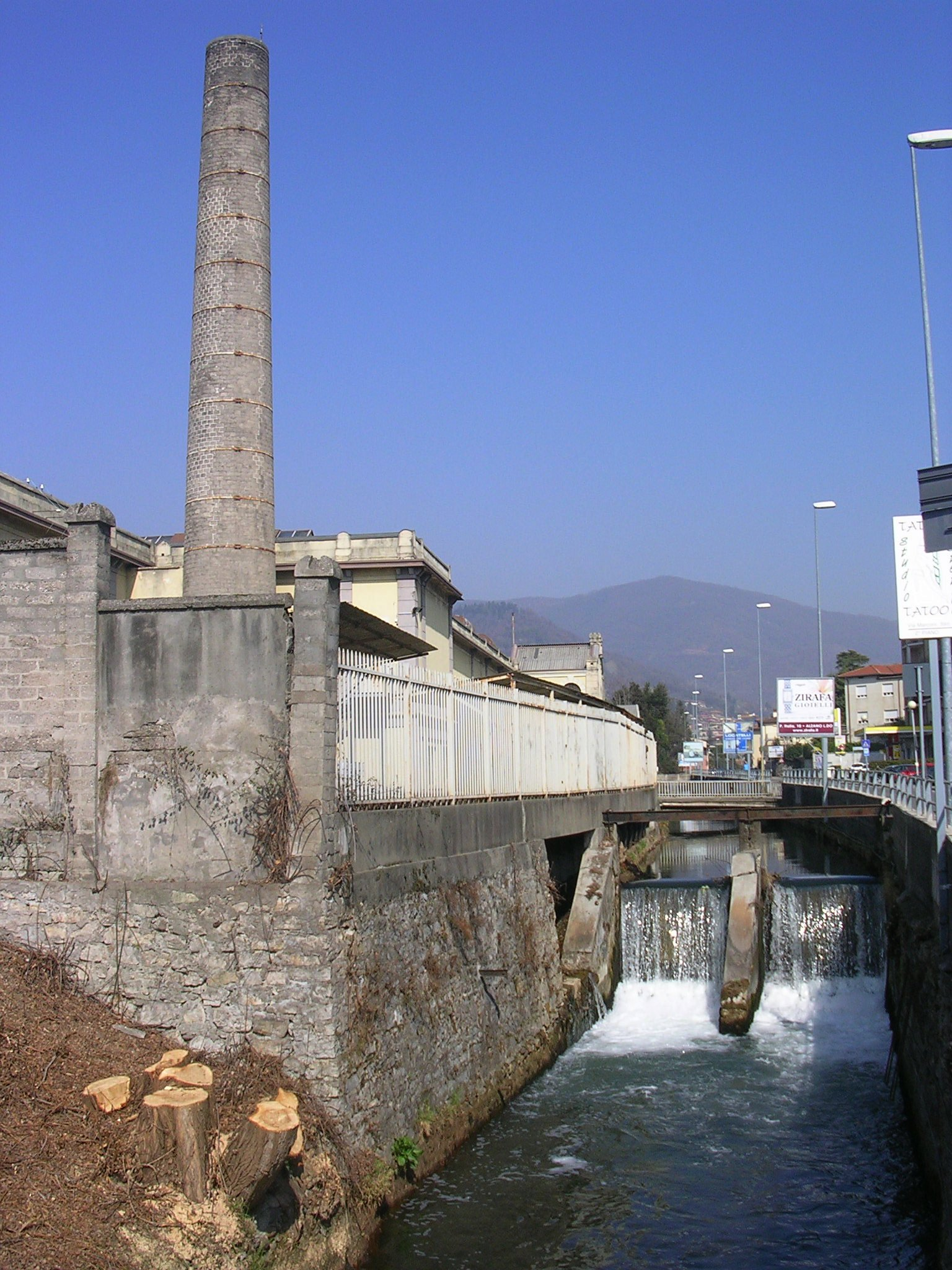 La roggia Serio Grande presso Ranica (Bergamo), a fianco della ditta Zopfi